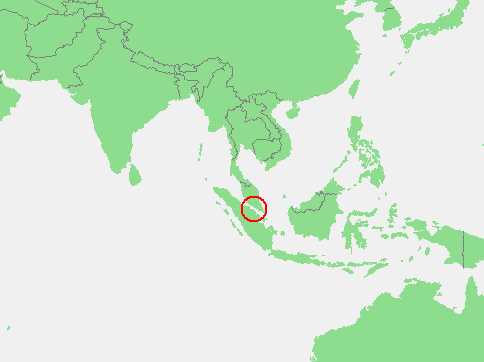 Localização do Estreito de Malaca. Kiswahili: Mlango wa Malakka (mviringo nyekundu).